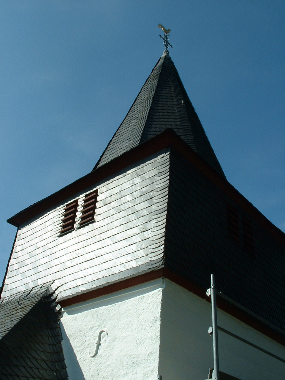 Evangelische Kirche Hochscheid im Hunsrück